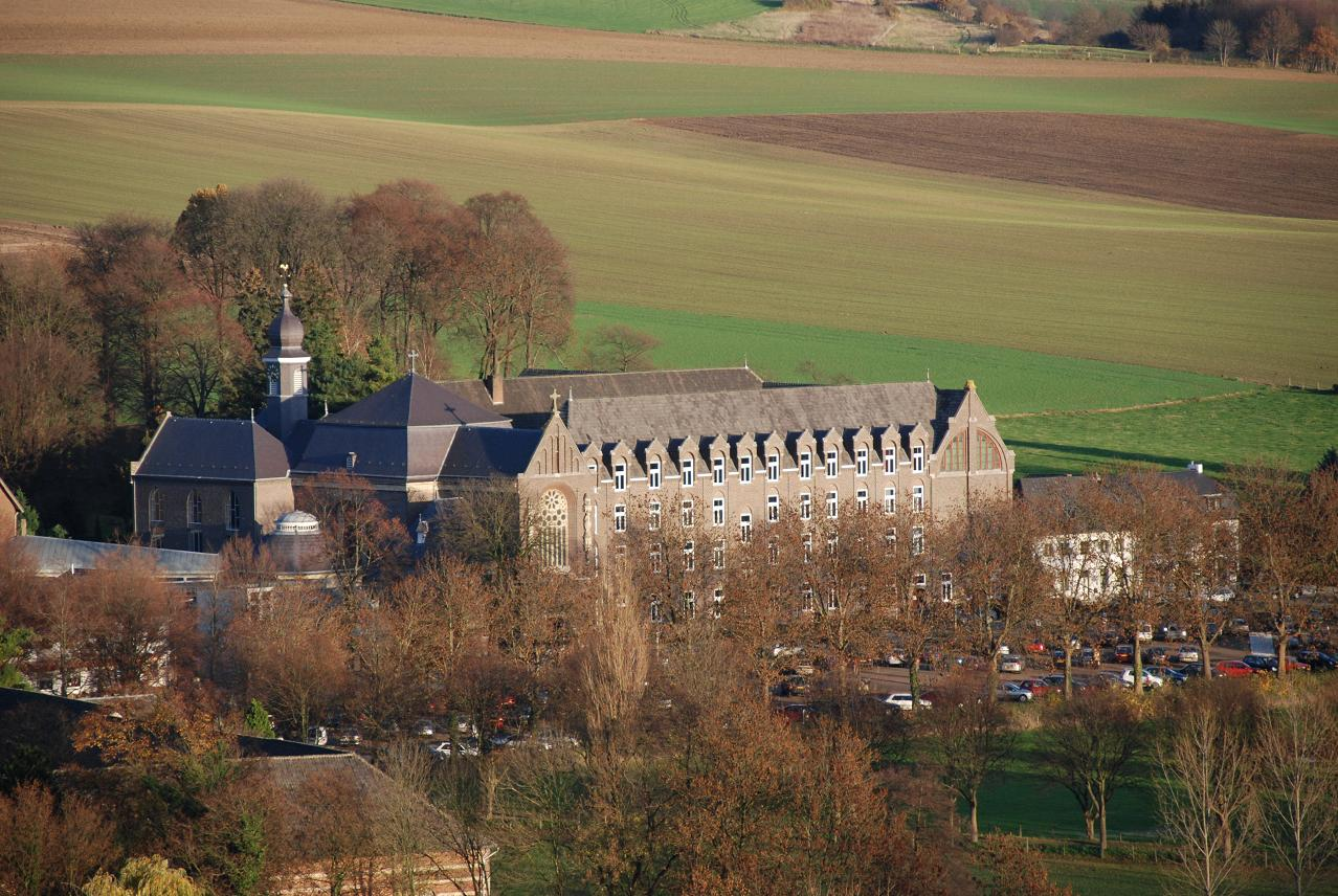 Limburgs: Wittem mèt kloaster vanaaf de Gulpenerberg